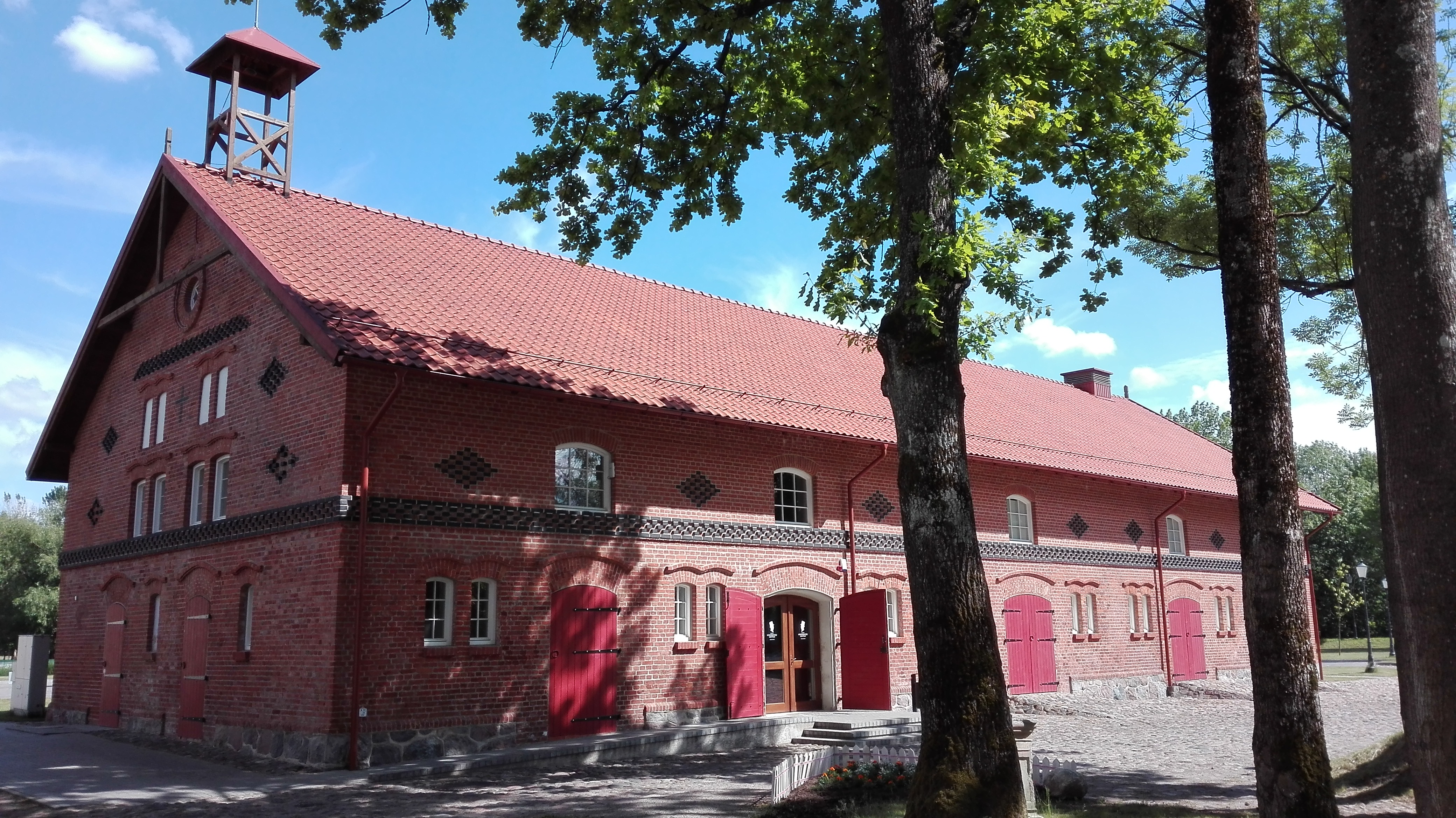 Vienas iš Hugo Šojaus dvaro pastatų